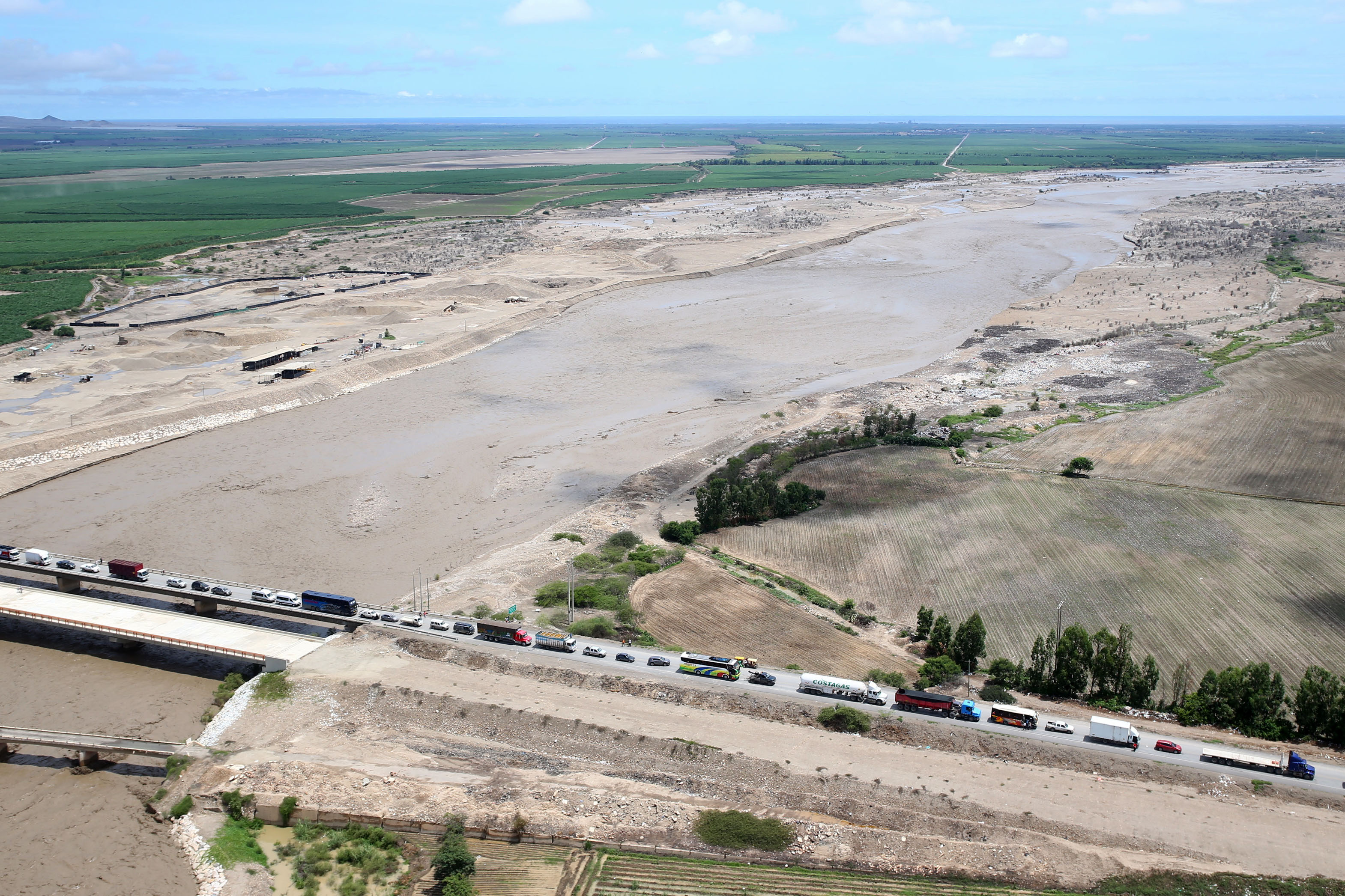 El Presidente del Consejo de Ministros, Fernando Zavala, acompañado por el Ministro de Defensa, Jorge Nieto, el Comandante General de la Fuerza aérea, general Javier Ramírez, sobrevoló la provincia de Ascope, azotada por el desborde del río Chicama. Previo a esto recibieron a los primeros pasajeros del puente aéreo realizado por la Fuerza Aérea del Perú. Posteriormente se reunió con autoridades de la región La Libertad, para coordinar acciones de respuesta a la emergencia.